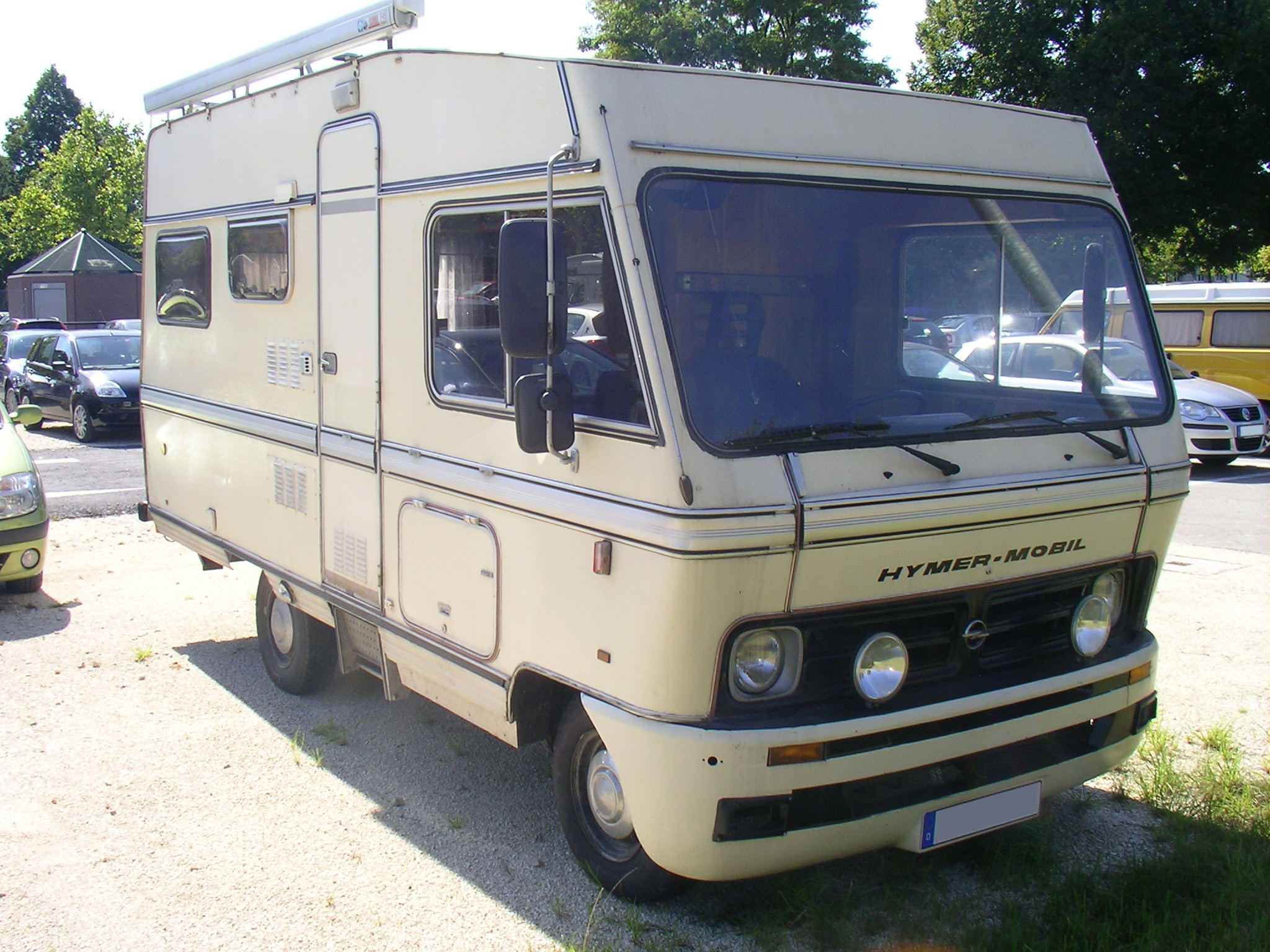 Bedford Blitz Wohnmobil Front.